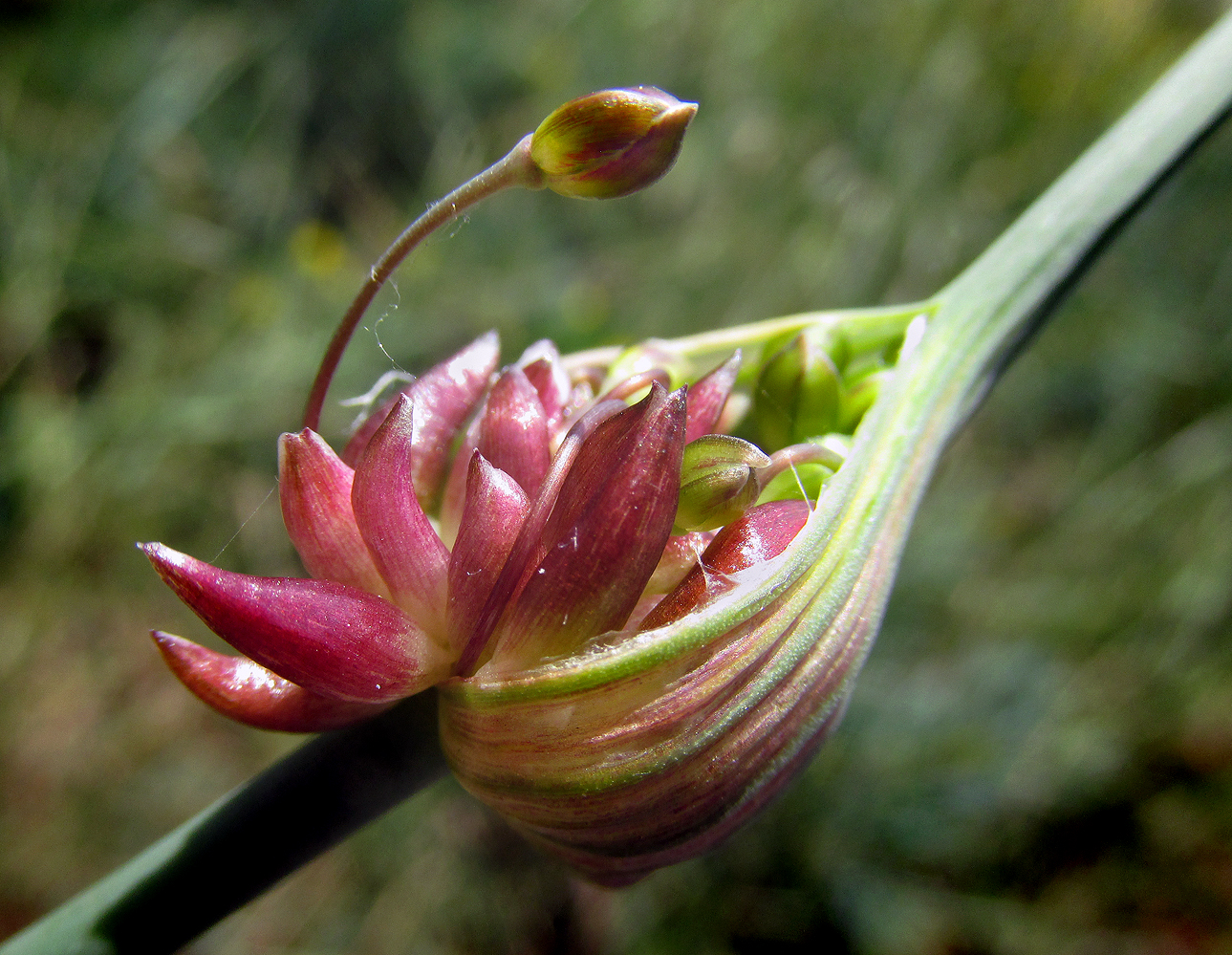 Backlök. Ystad 2016.